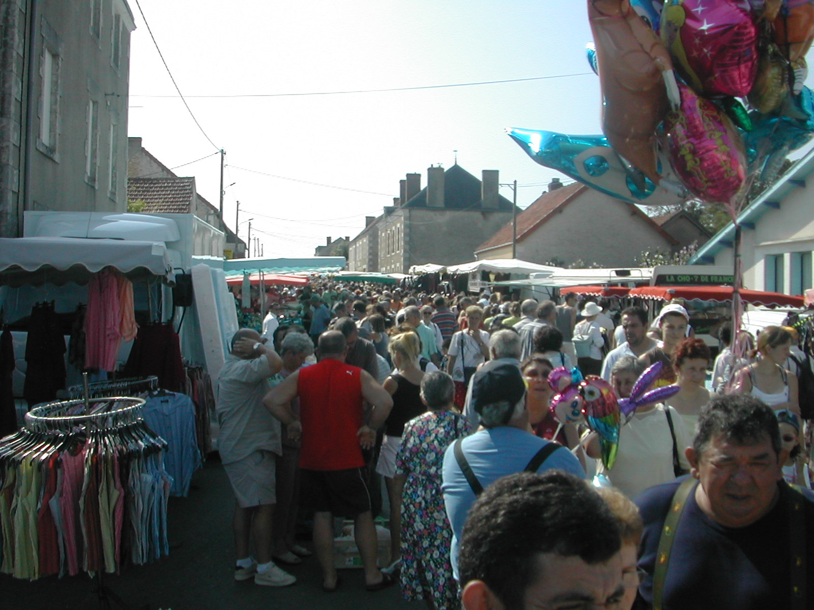 La rue principale des hérolles un jour de foire